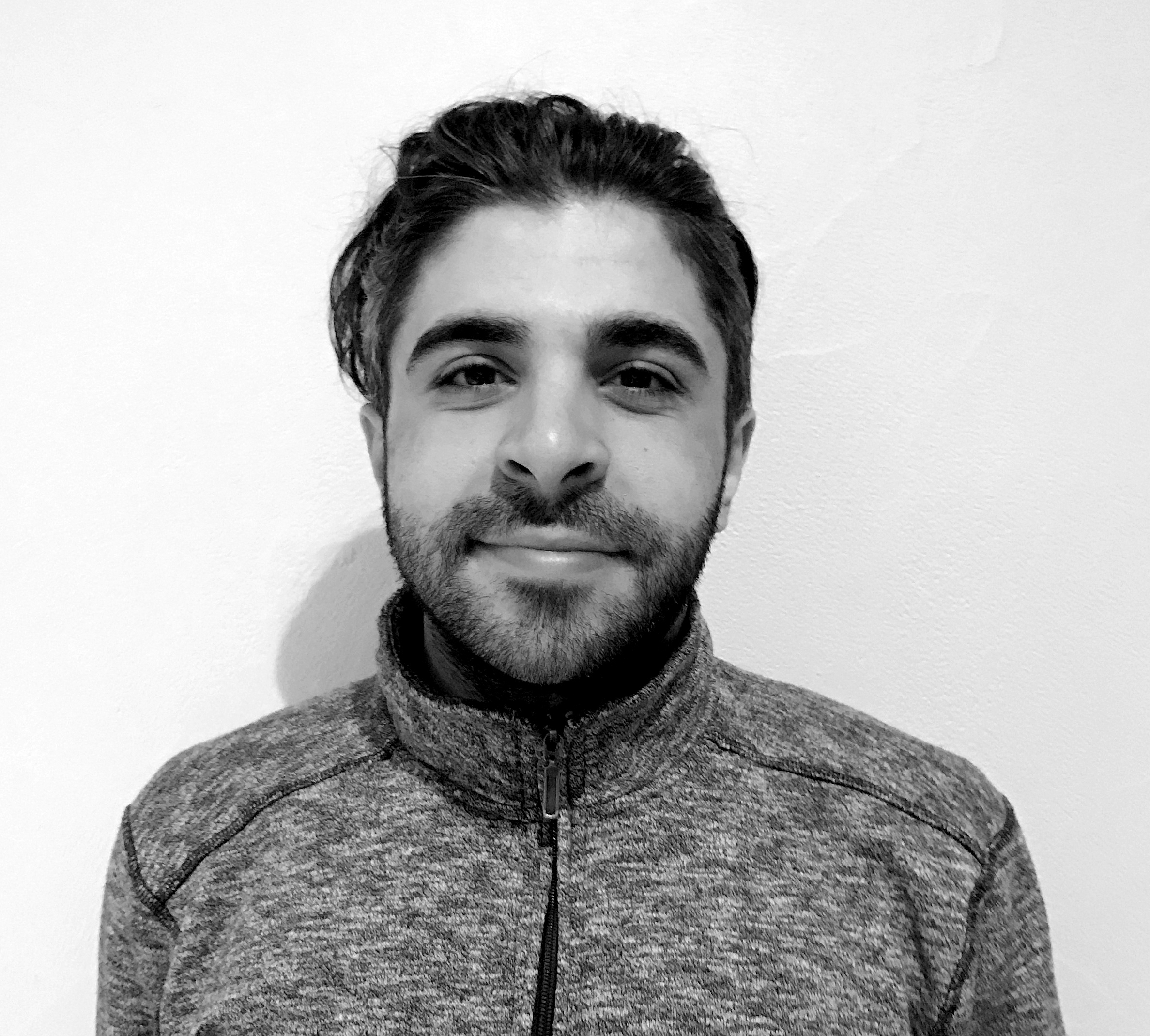 Mher Mkrtchyan en janvier 2017.